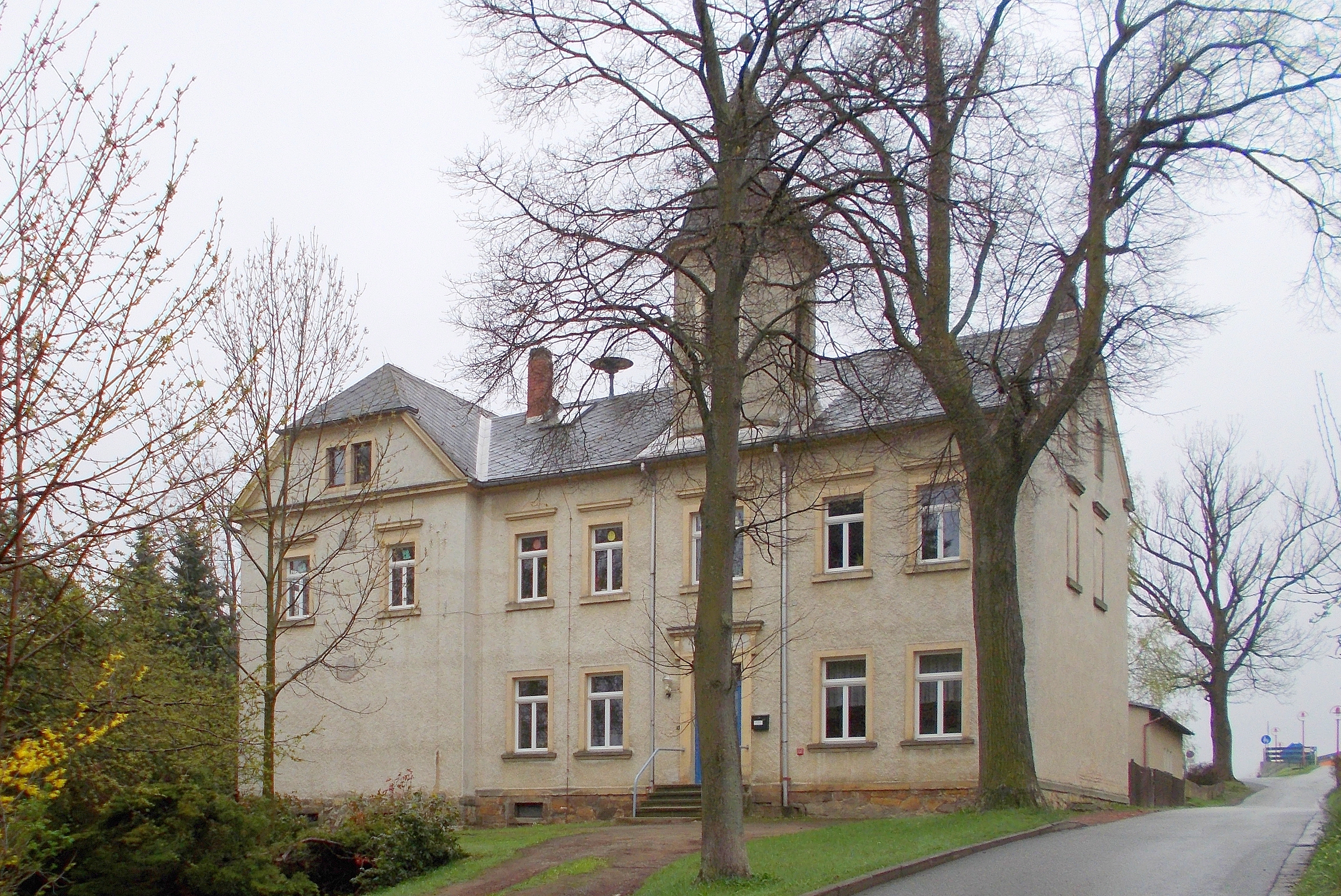 Nach dem die erste Schule nicht mehr ausreichte wurde 1888 diese zweite Schule in Obercarsdorf gebaut. Sie wird heute noch als Schule für integriertes Lernen genutzt.